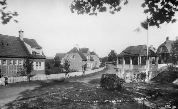 Hasle Hageby 1921